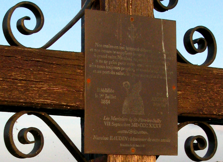 Saint-Père-sur-Loire (Loiret, France) - Détail de la croix près du pont, érigée par les bateliers qui invoquent leur saint patron, Saint-Nicolas. Désolé pour mauvaise lisibilité de la plaque ! Cette photo n'est qu'un "crop" (retaillage). Voici une transcription hélas partielle du texte : Nos mains en ton honneur élèvent (cette) croix et nos coeurs te supplient ô grand saint Nicolas .... Si tu ne pries pour nous .... Sois nous toujours propice et (conduis nous) ... et au port du salut ... Réédifiée par le 1 juillet AMMON 1884 Martial Les Mariniers de St-Pierre-lès-Sully VII Septembre MDCCCXXXV Narcisse BAUDIN : bâtonnier de cette année Réédifiée le 28 juin 1937